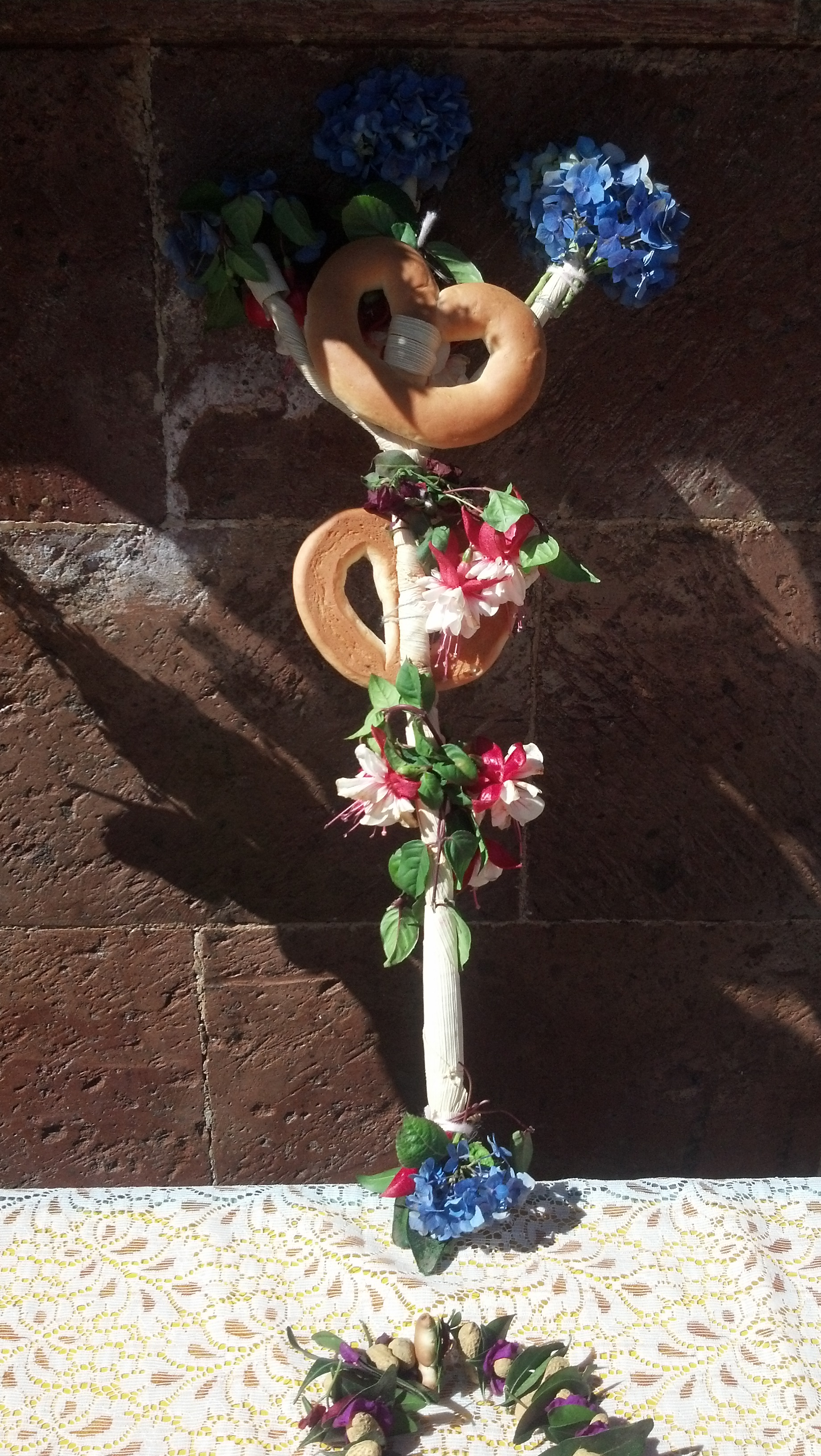 El pan cruzado es un pan casi exclusivo de los pueblos y comunidades de Acaxochitlán, y se usa en diversas ceremonias y festividades. Es un pan de trigo de sabor semidulce y color dorado, con forma parecida a la de un corazón o unos anteojos. Algunos vecinos del municipio comentan que este pan representa las canillas (huesos) de los difuntos. Para el investigador Marco Buenrostro Hernández, representa los huesos de la cadera y por tanto es un símbolo de fertilidad.